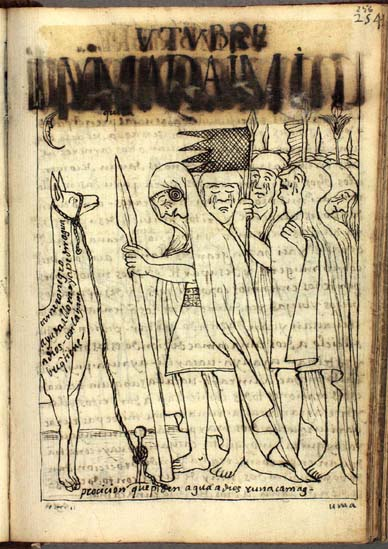 Oma Raymi Quilla